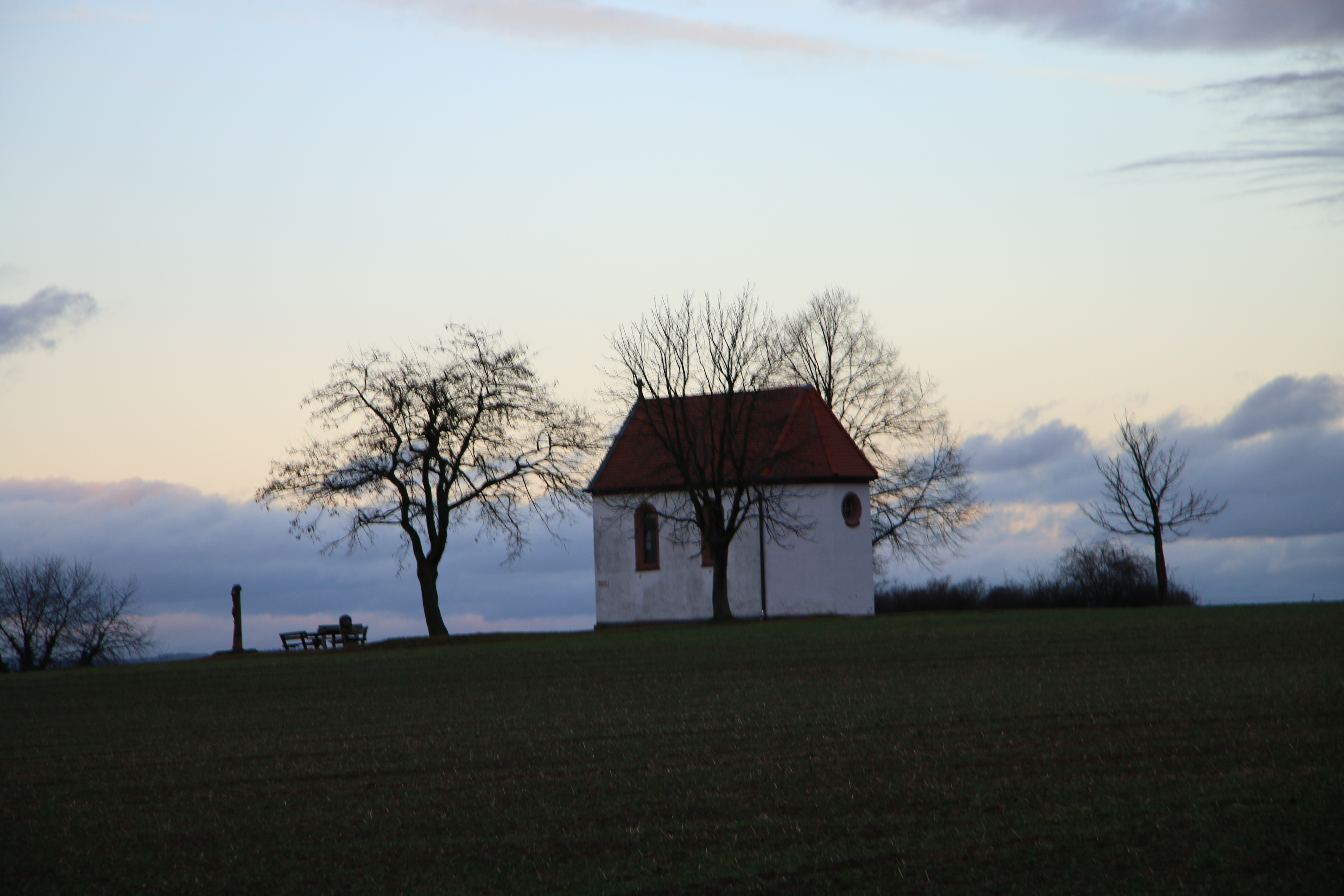 Ansicht vom ende der "Pflaumheimer Hohl"